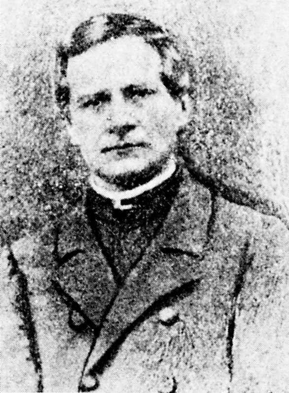 Іван Гушалевич — український поет, письменник і драматург, політичний діяч, журналіст, видавець, теолог, греко-католицький священик.